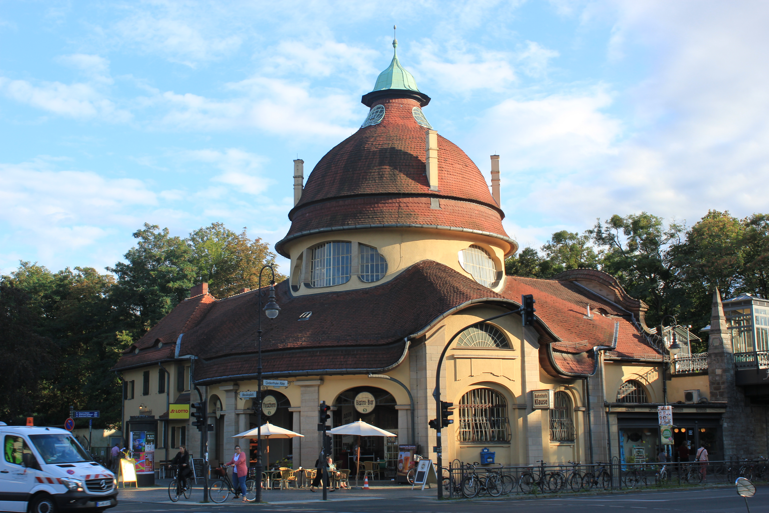 Станция метро Мексикоплатц